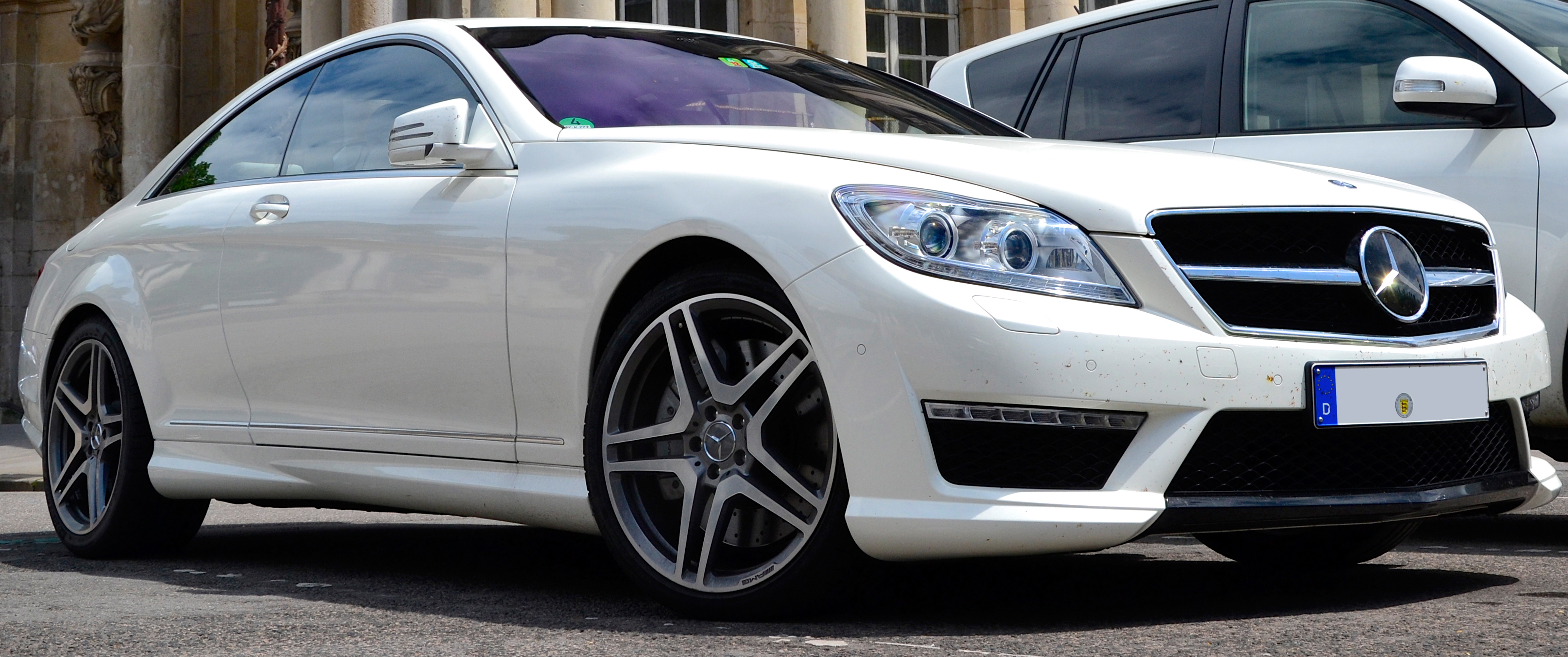 Mercedes-Benz CL63 AMG